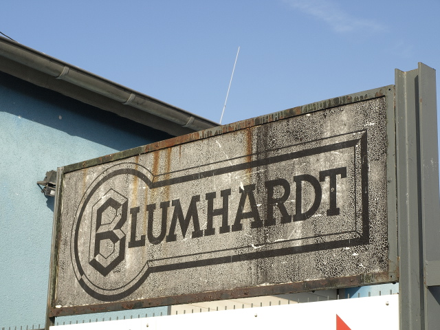 Schild mit dem Schriftzug von Blumhardt Fahrzeugbau in Wuppertal Vohwinkel auf dem ehemaligen Firmengelände